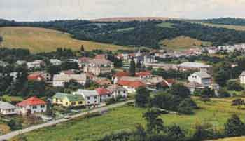 pohlad z vychodnej strany